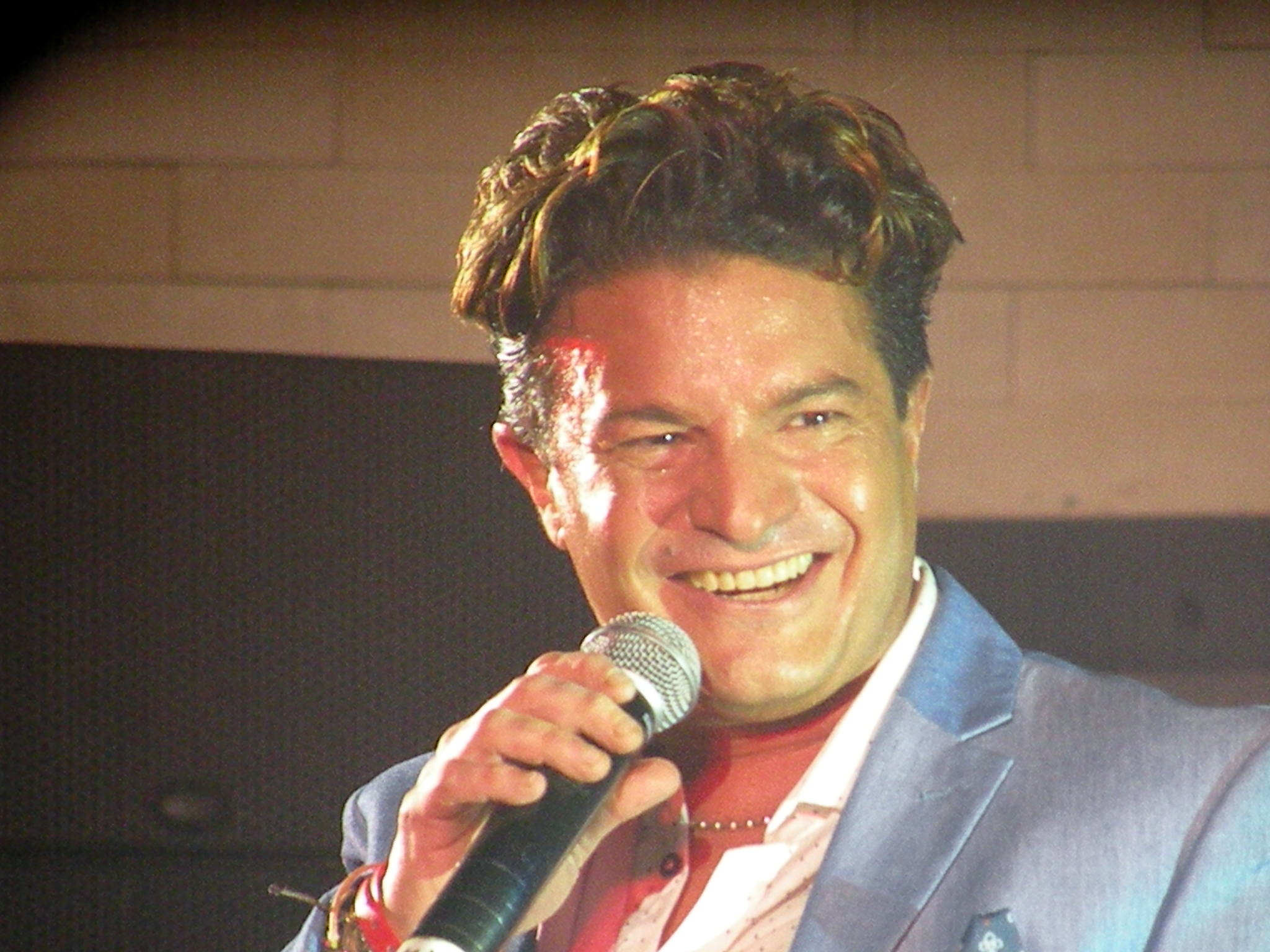 Concierto Juntos en Cancún